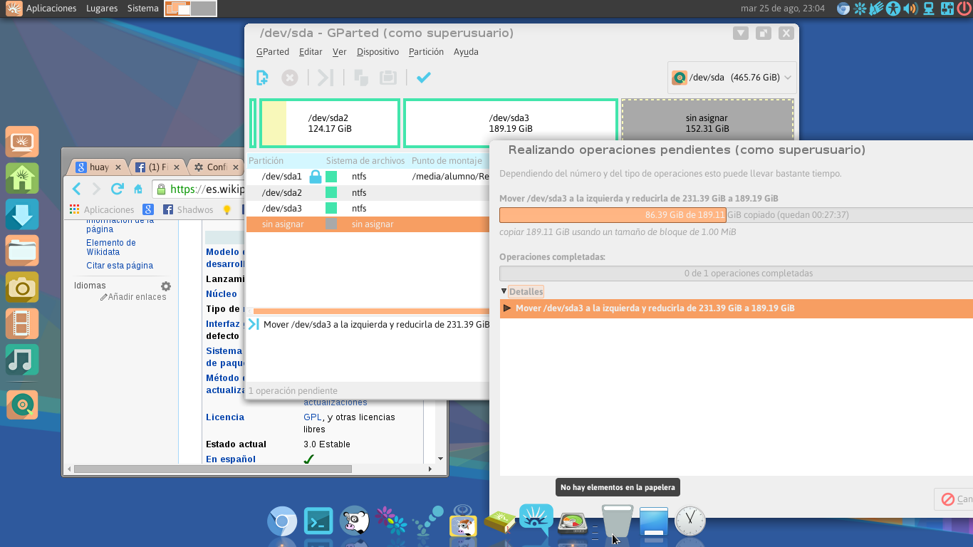 Escritorio de Huayra 3.0